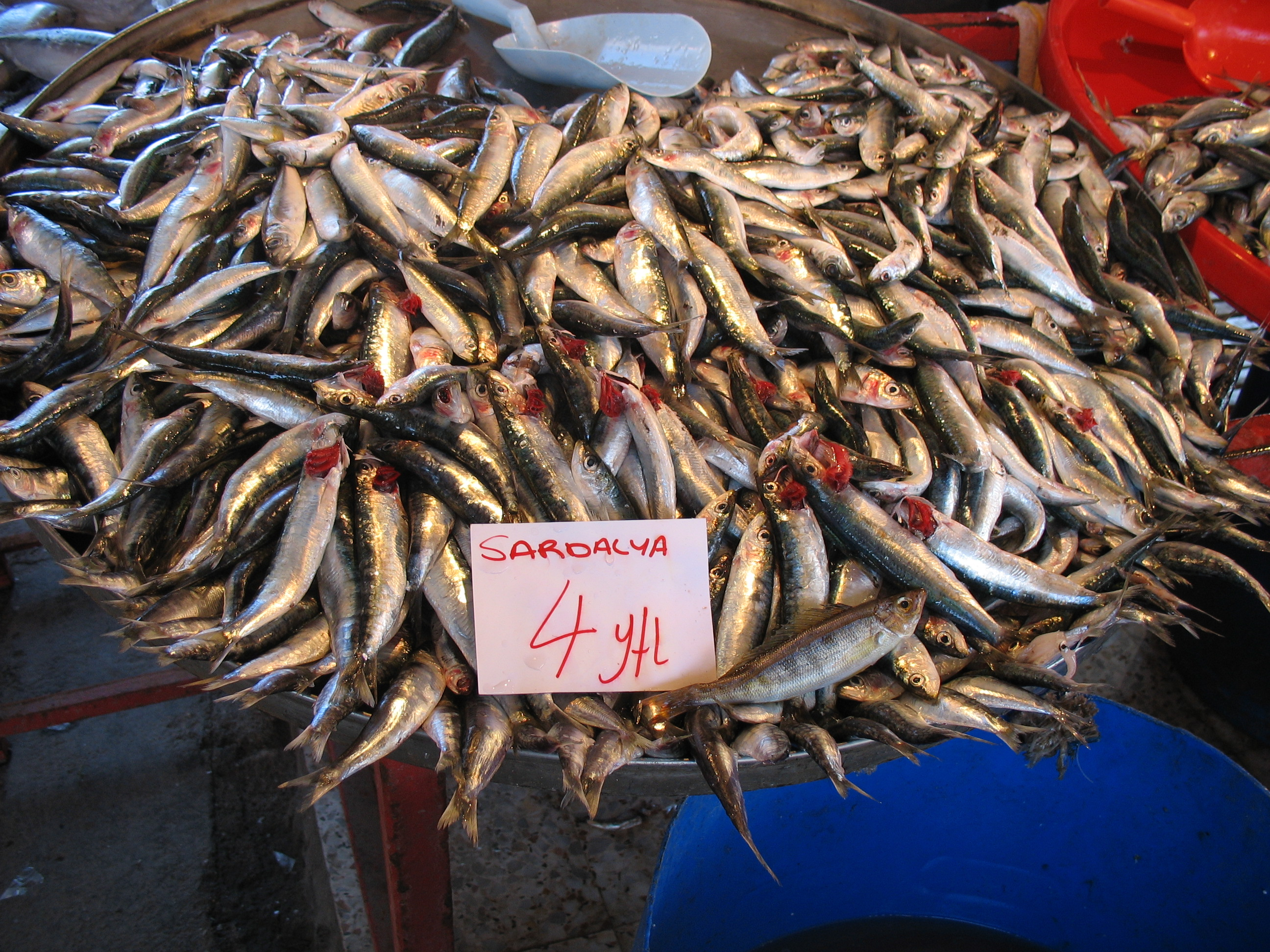 Pazardan bir resim